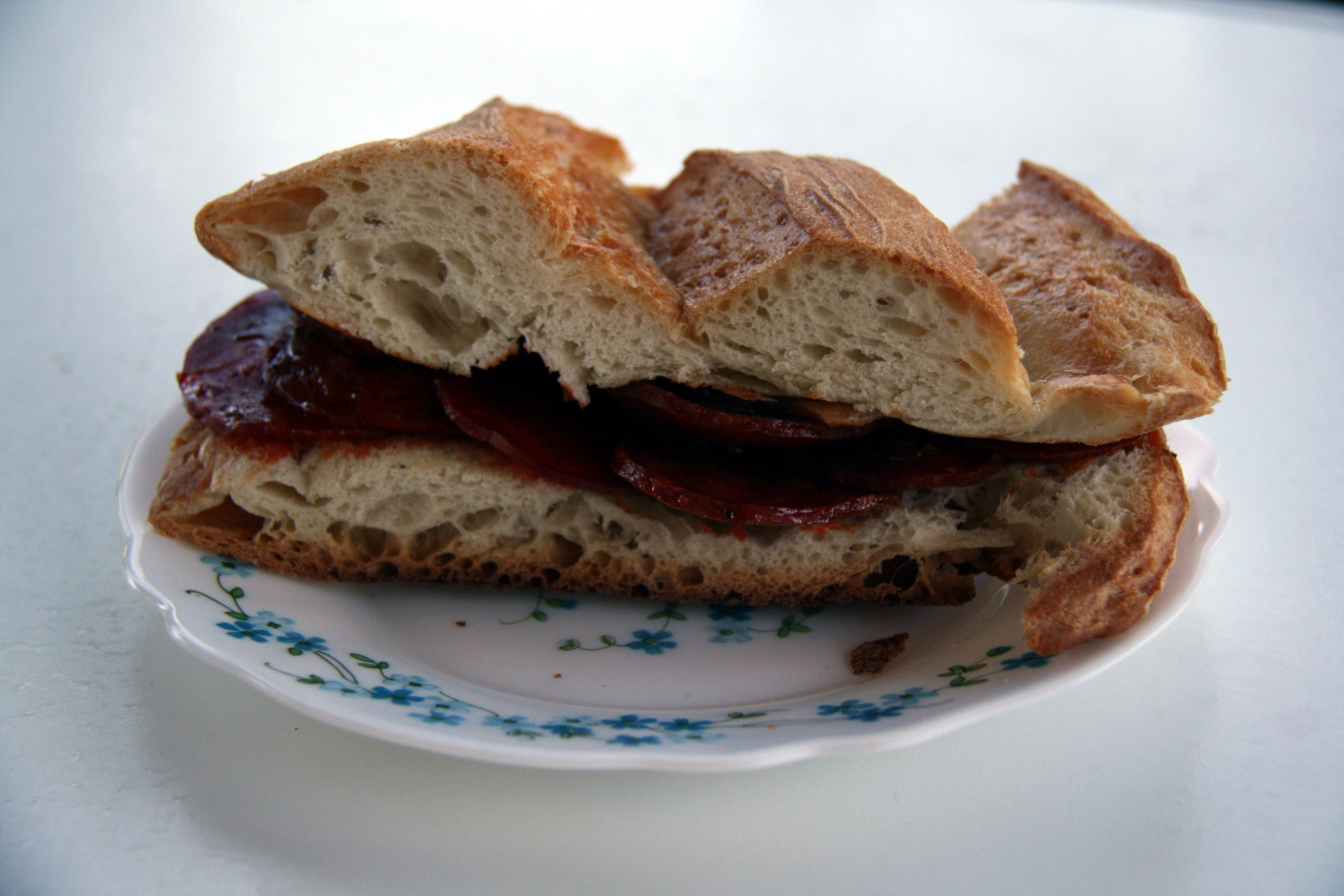 belegtes Brötchen mit chorizo